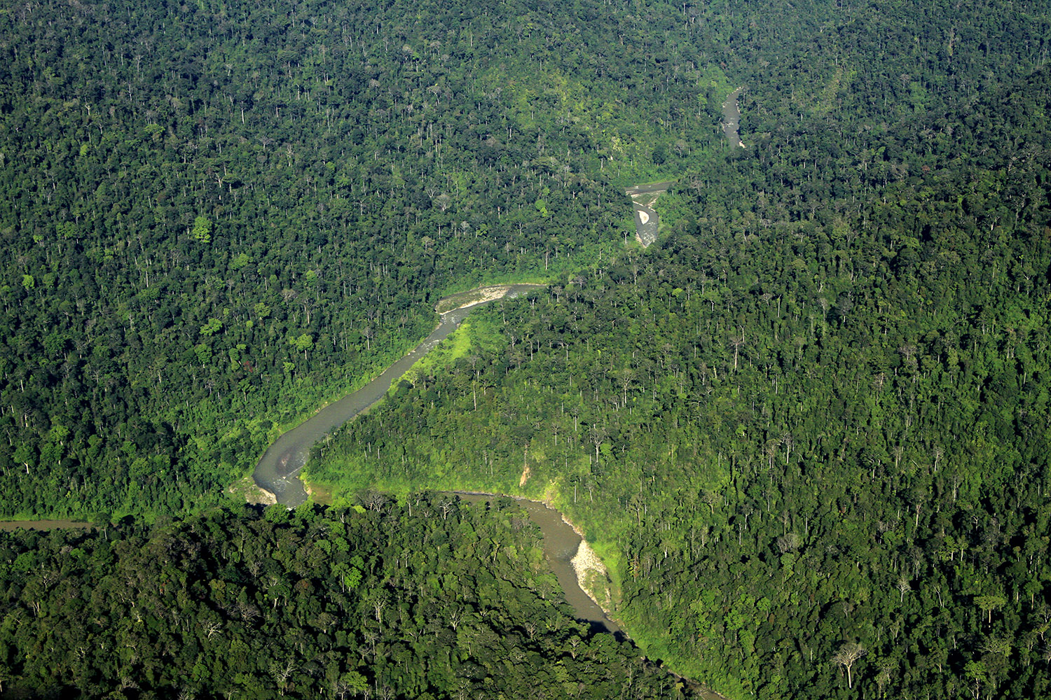 Hutan hujan di zona inti Taman Nasional Gunung Leuser, Provinsi Aceh, Indonesia.